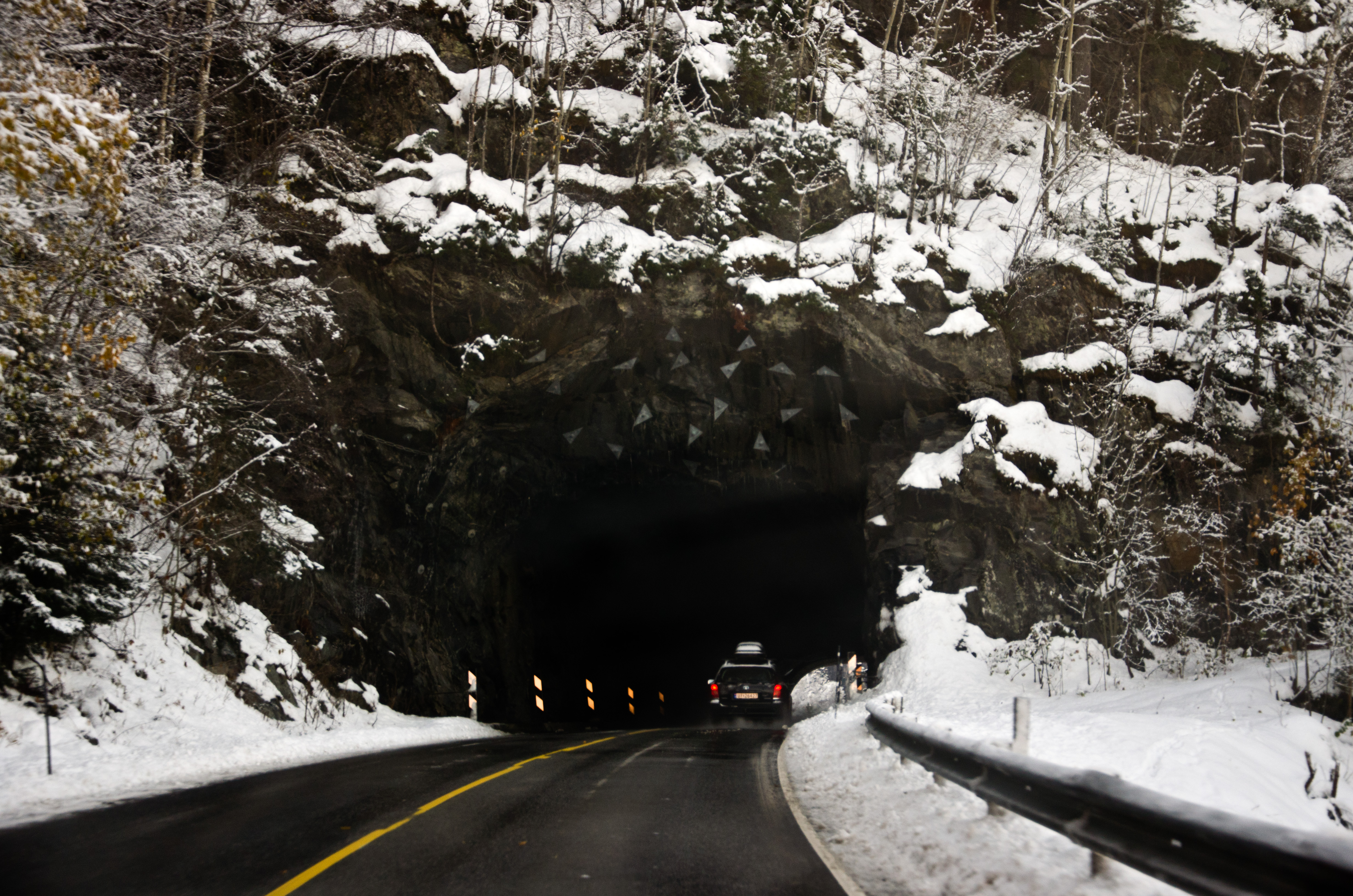 Torviktunnelen på fylkesvei 64, Rauma, Møre og Romsdal